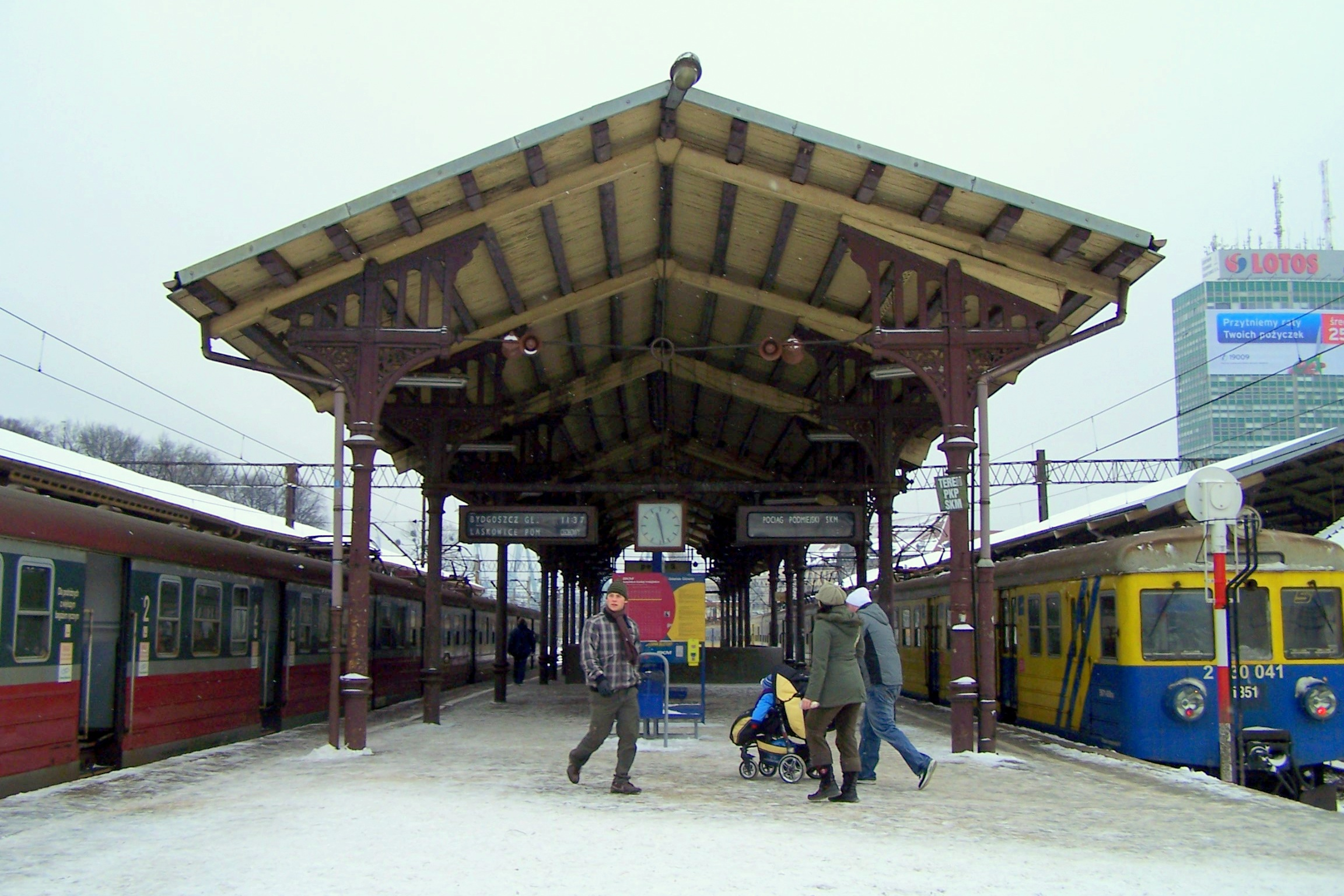 peron 4 w Gdańsku Głównym